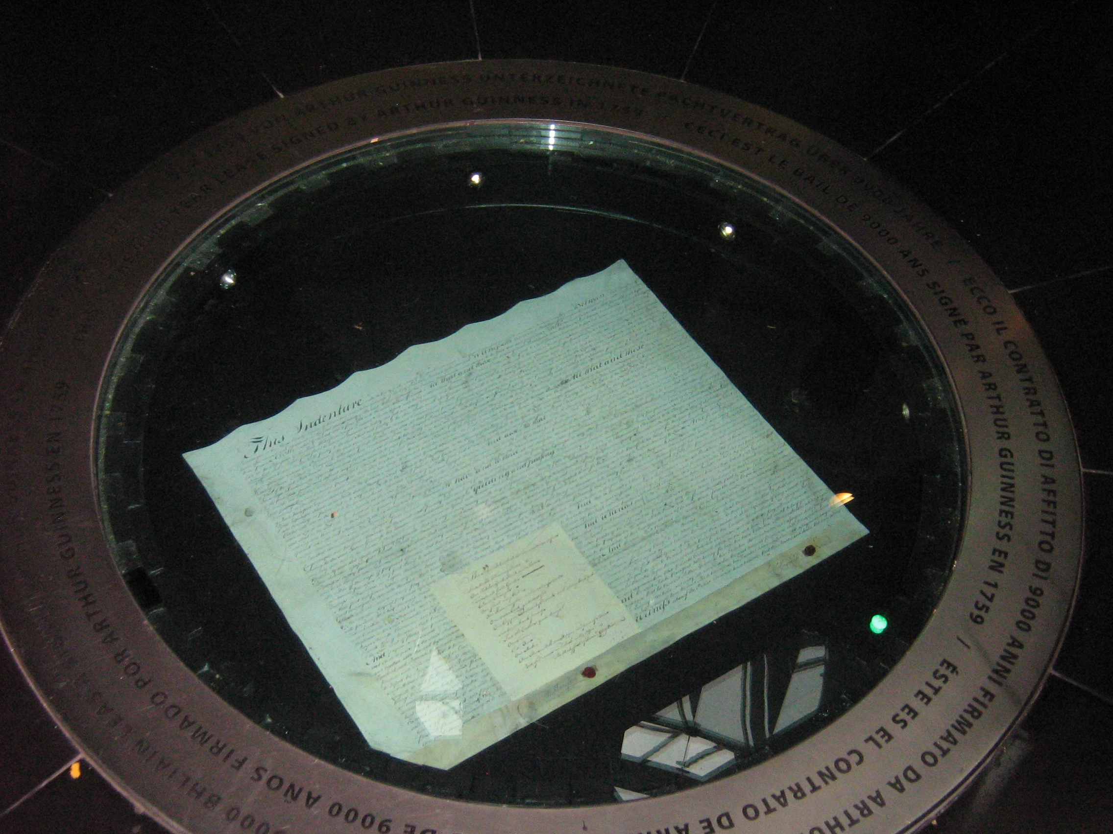 Der Pachtvertrag von Arthur Guinness, den dieser 1759 abschloss, in einer Vitrine im Guinness Store House